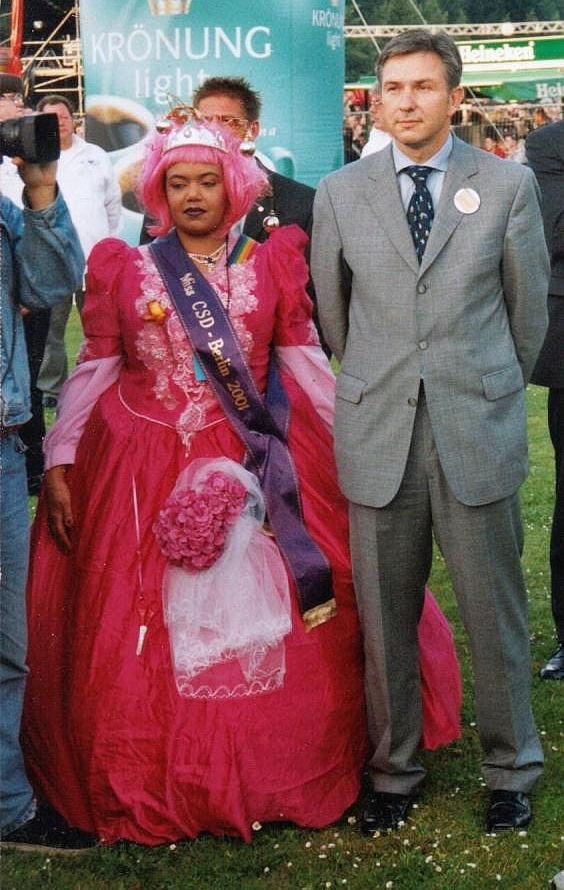 Klaus Wowereit gibt auf dem Christopher-Street-Day in Berlin ein Interview für den Berliner Radiosender 88,8. Aufgenommen 2001 auf dem Rasen vor der Siegessäule, deren Sockel man im Bildhintergrund sieht.